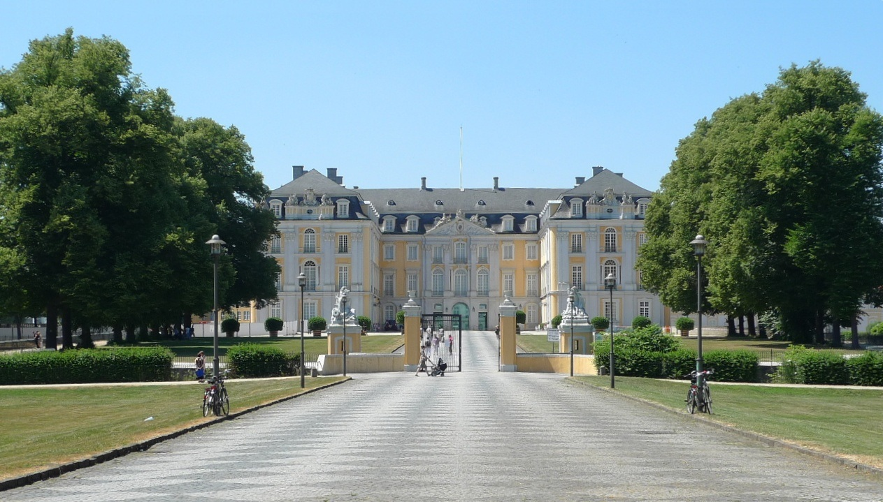 Schloss Augustusburg – Blick vom Osten